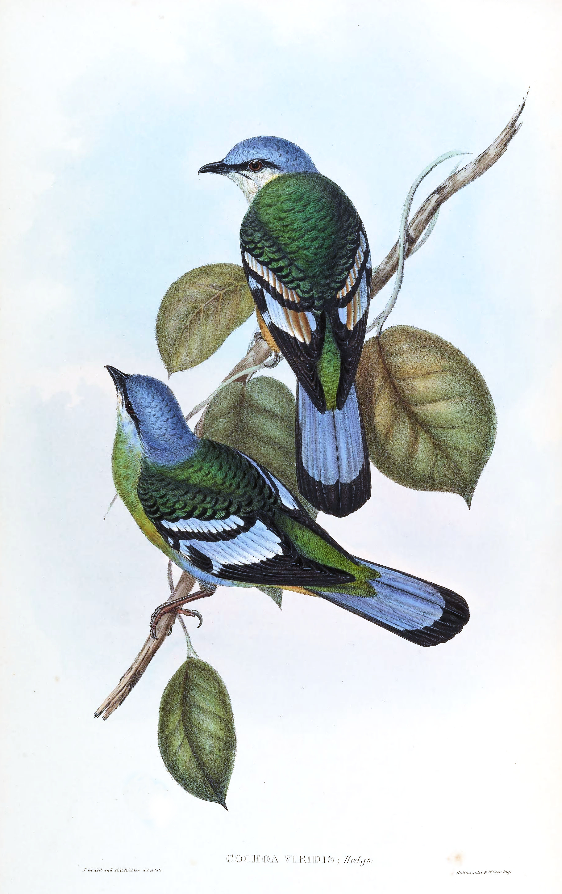 Green Cochoa Cochoa viridis Hodgson